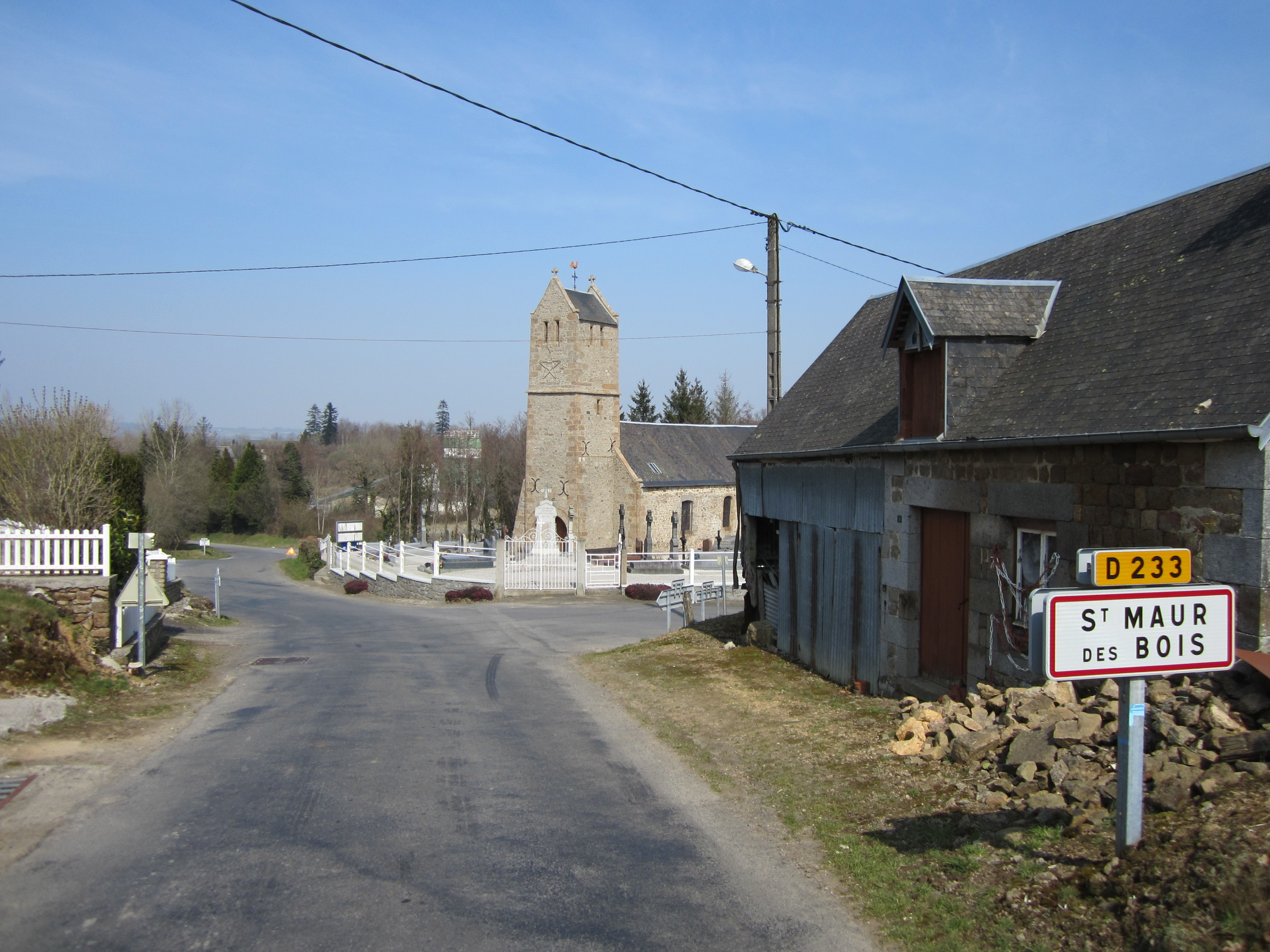 Saint-Maur-des-Bois